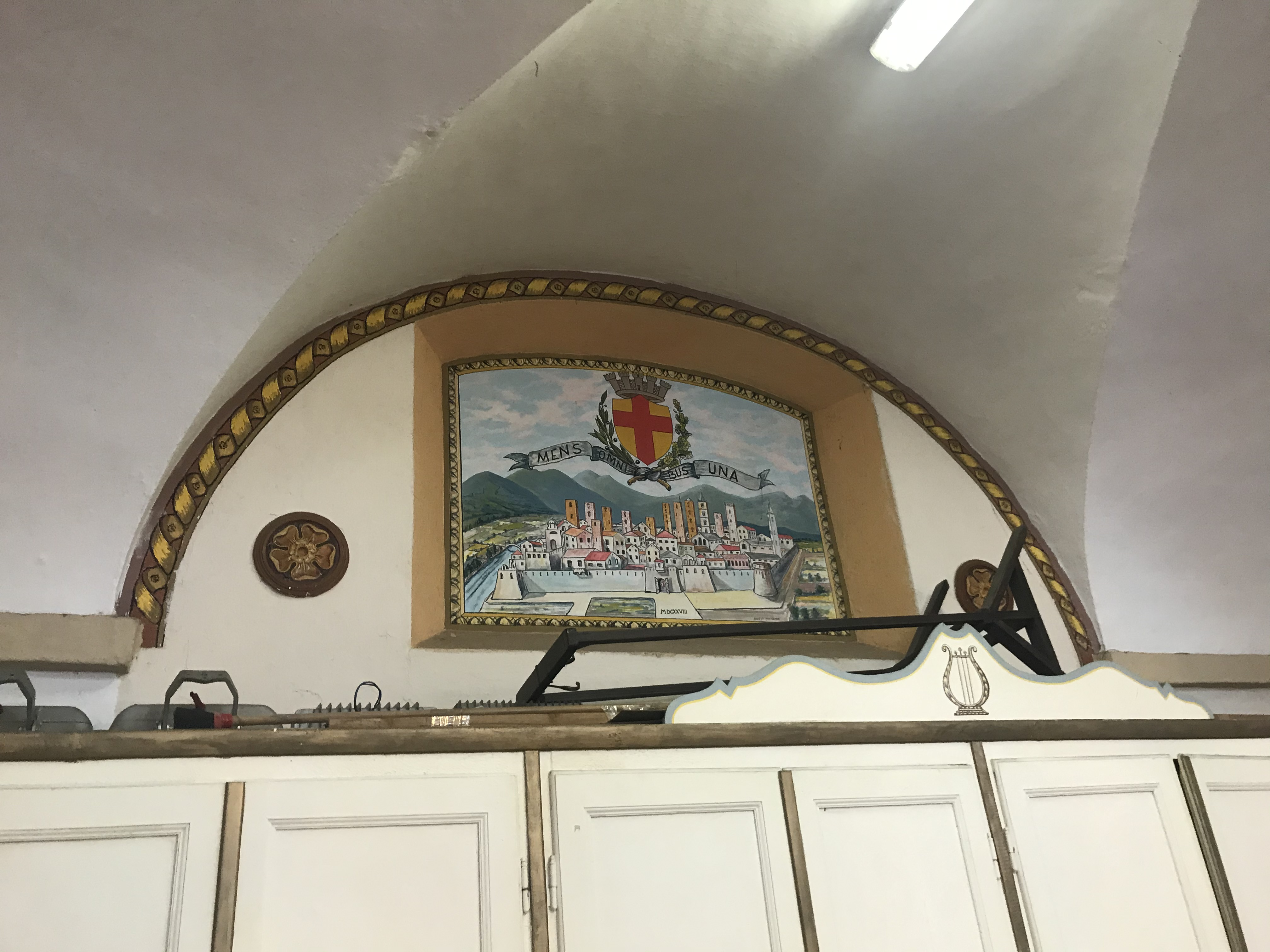 Affresco di Albenga in San Domenico rappresentante la città qualche secolo fa